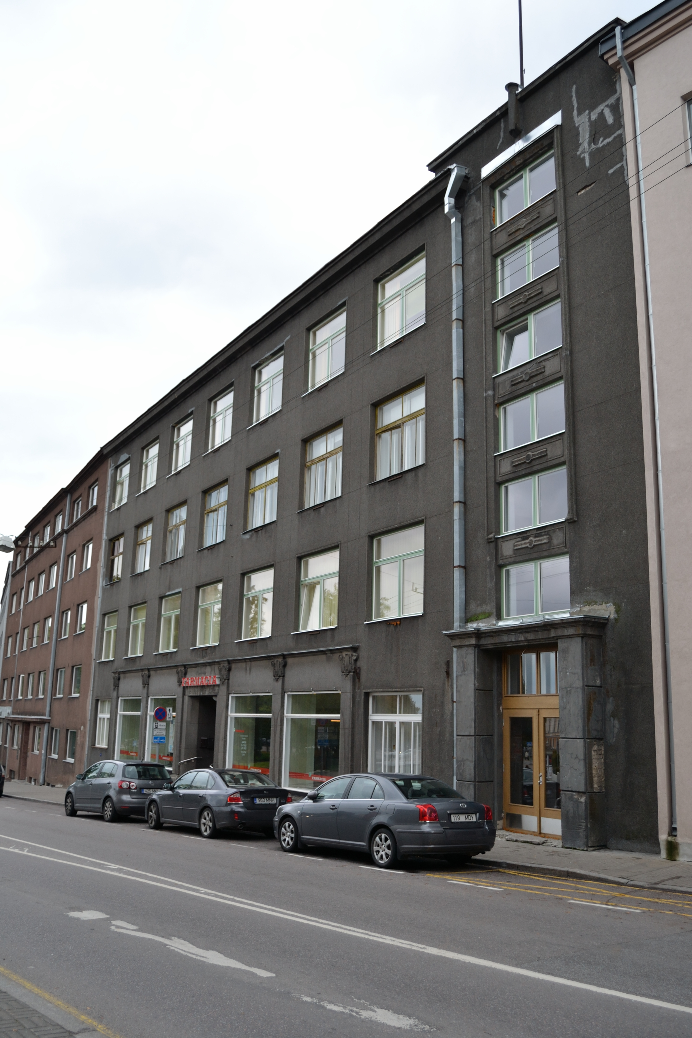 Tallinn, raviasutuste kompleks Tõnismägi 5, 1909-1939